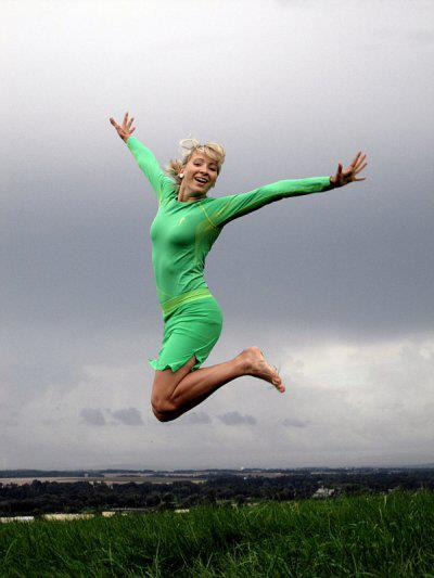 Annett Finger